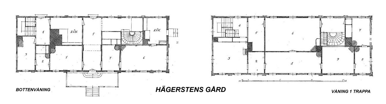 Hägerstens gård ritningar